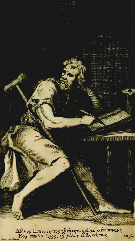 Bild Epiktets in der lateinischen Versfassung des Handbüchleins von Edward Ivie unter dem Titel Epicteti Enchiridion Latinis versibus adumbratum, 1715; Übersetzung des Epigramms (Anthologia Palatina 7,676): „Ich war der Sklave Epiktet, mit dem verkrüppelten Leib, ein Iros wegen meiner Armut und Freund der Unsterblichen.“